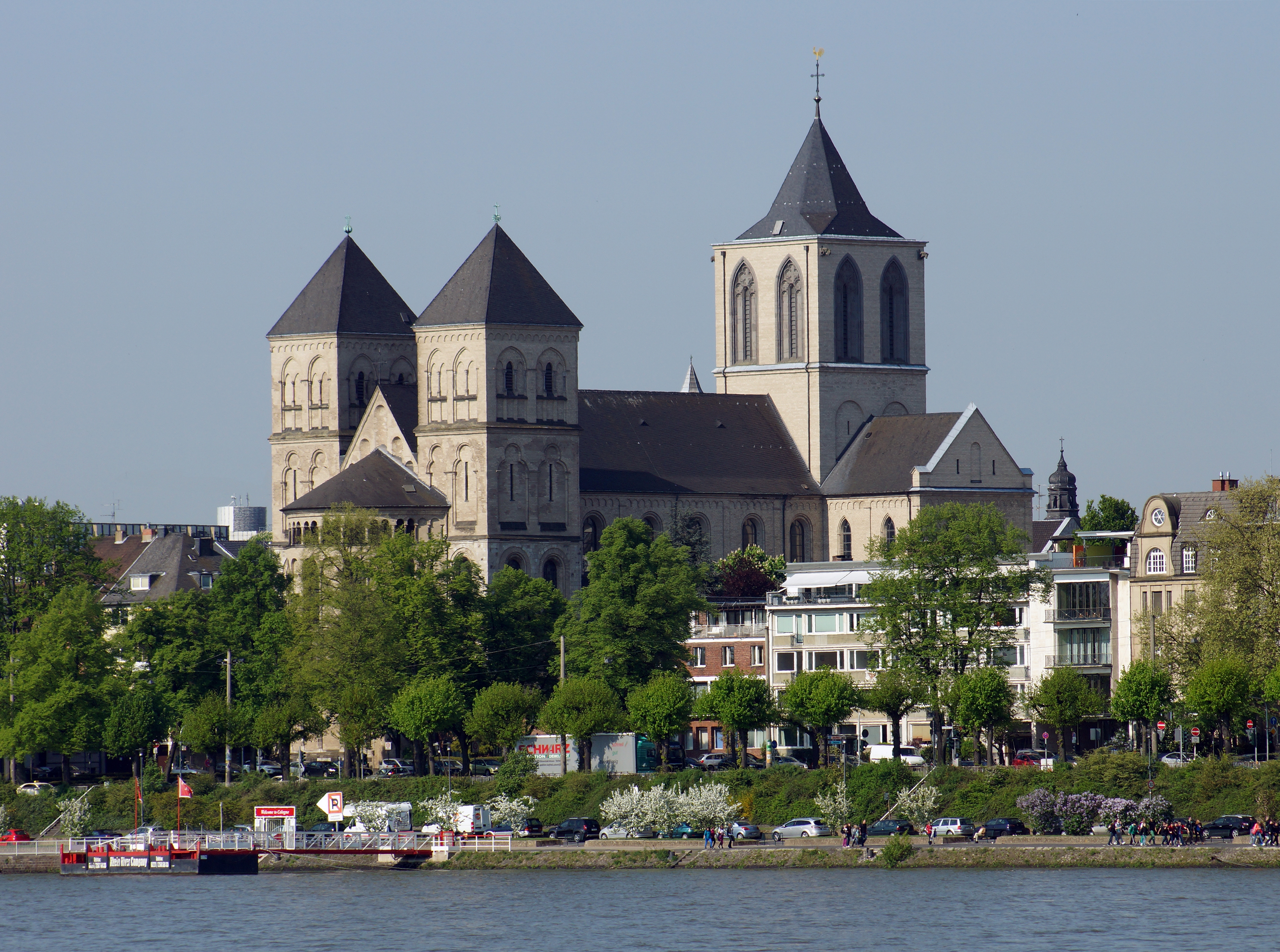 St. Kunibert von der rechten Rheinseite aus gesehen.